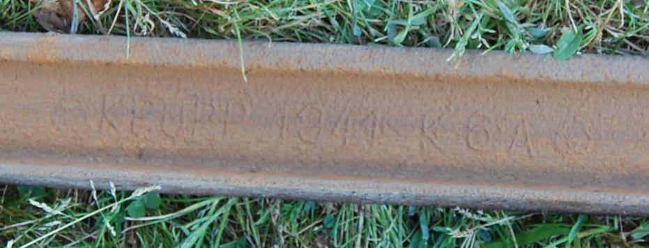 Prägung auf Schiene der ehemaligen Scheineisenbahn: Krupp K6A 1941